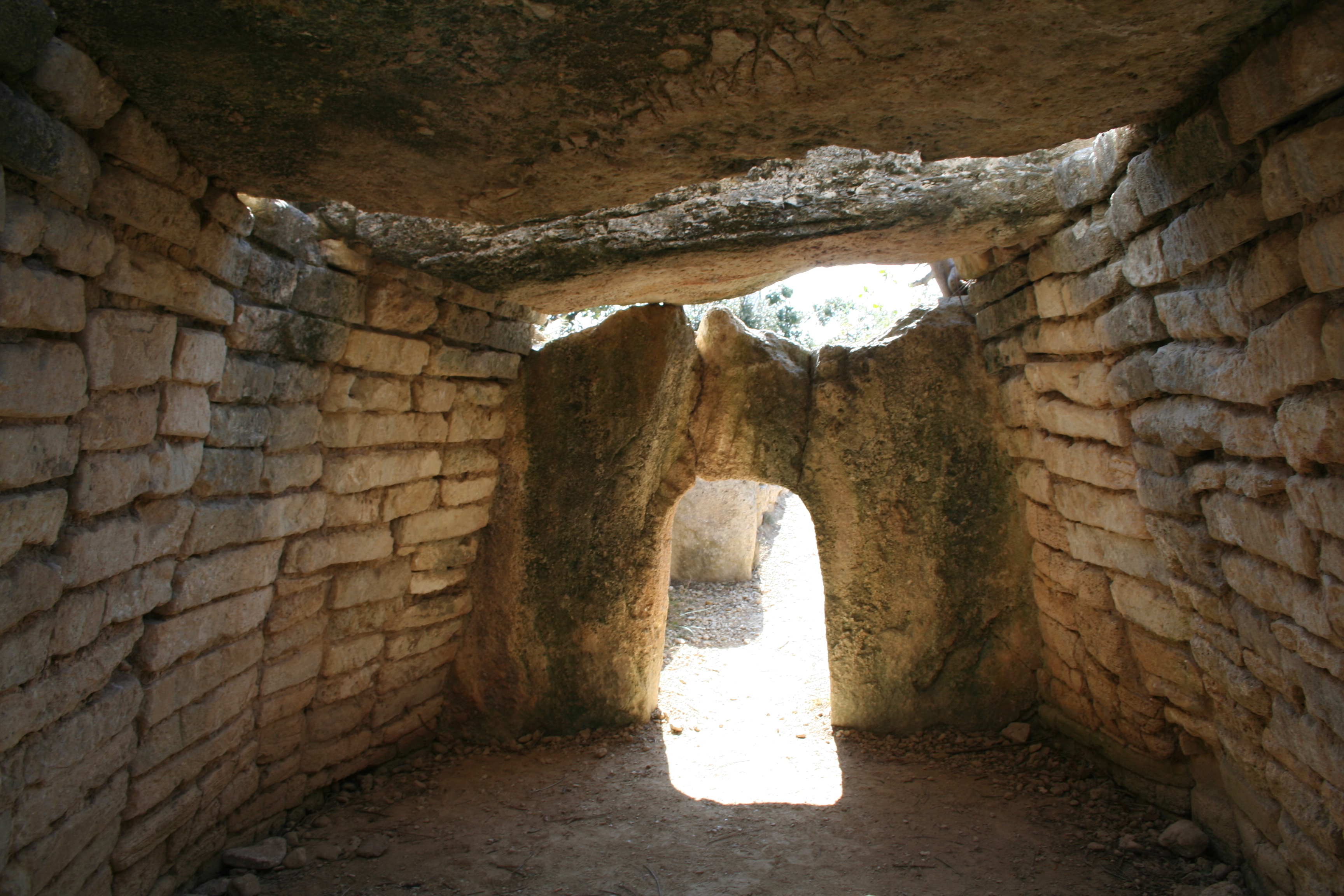 Le Pouget (Hérault) - dolmen (vue intérieure vers l'entrée).